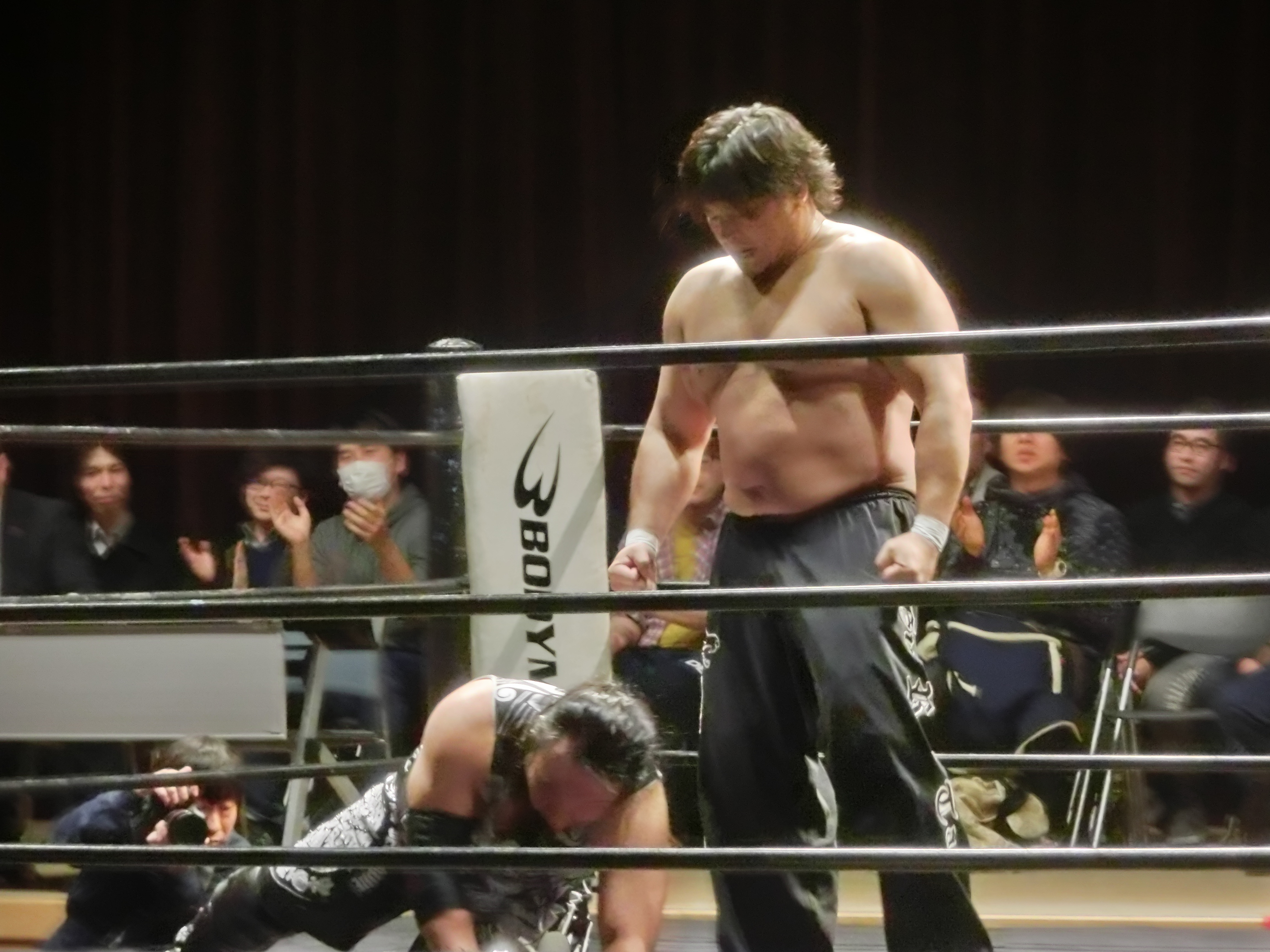 Masa Saito mourning performance